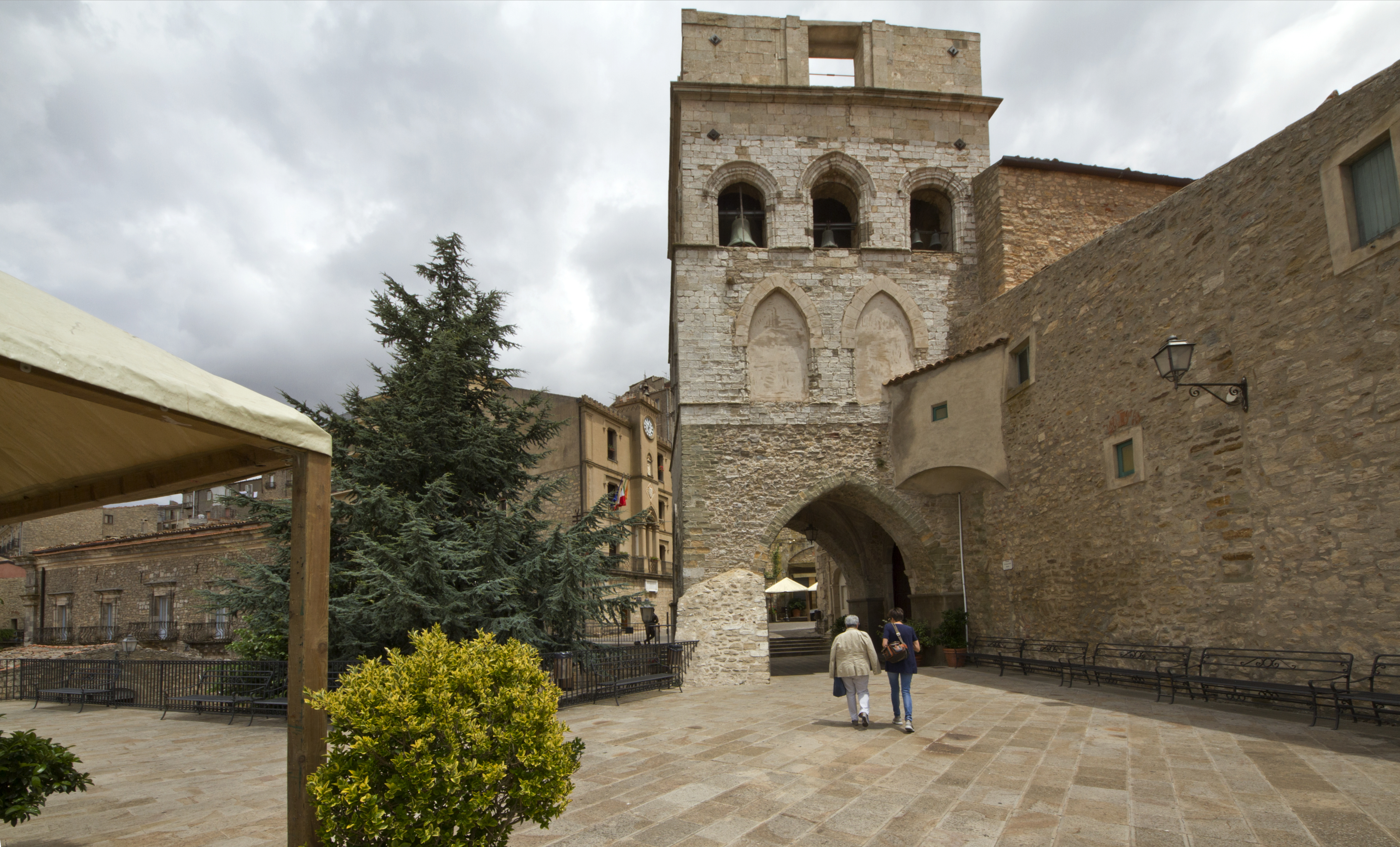 Torre dei Ventimiglia, Chiesa Madre, Gangi PA, Sicily, Italy